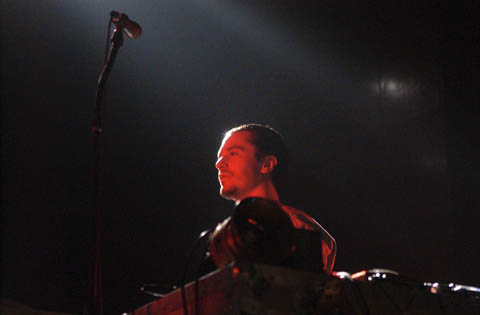 Fantomas@aula magna